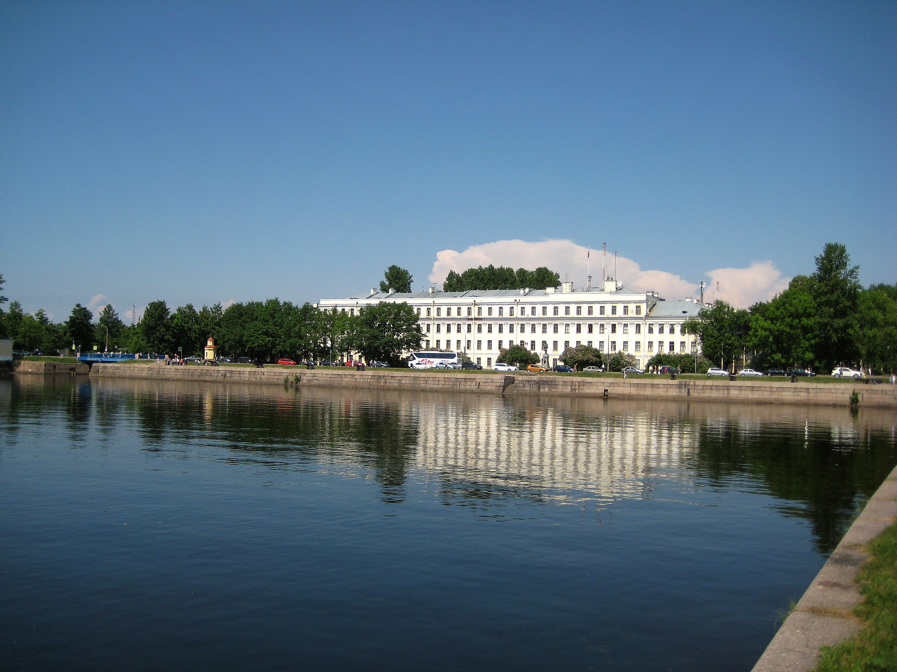 Пруд Итальянский (Санкт-Петербург и Лен.область, Кронштадт, Итальянский пруд (южнее Итальянского дворца))